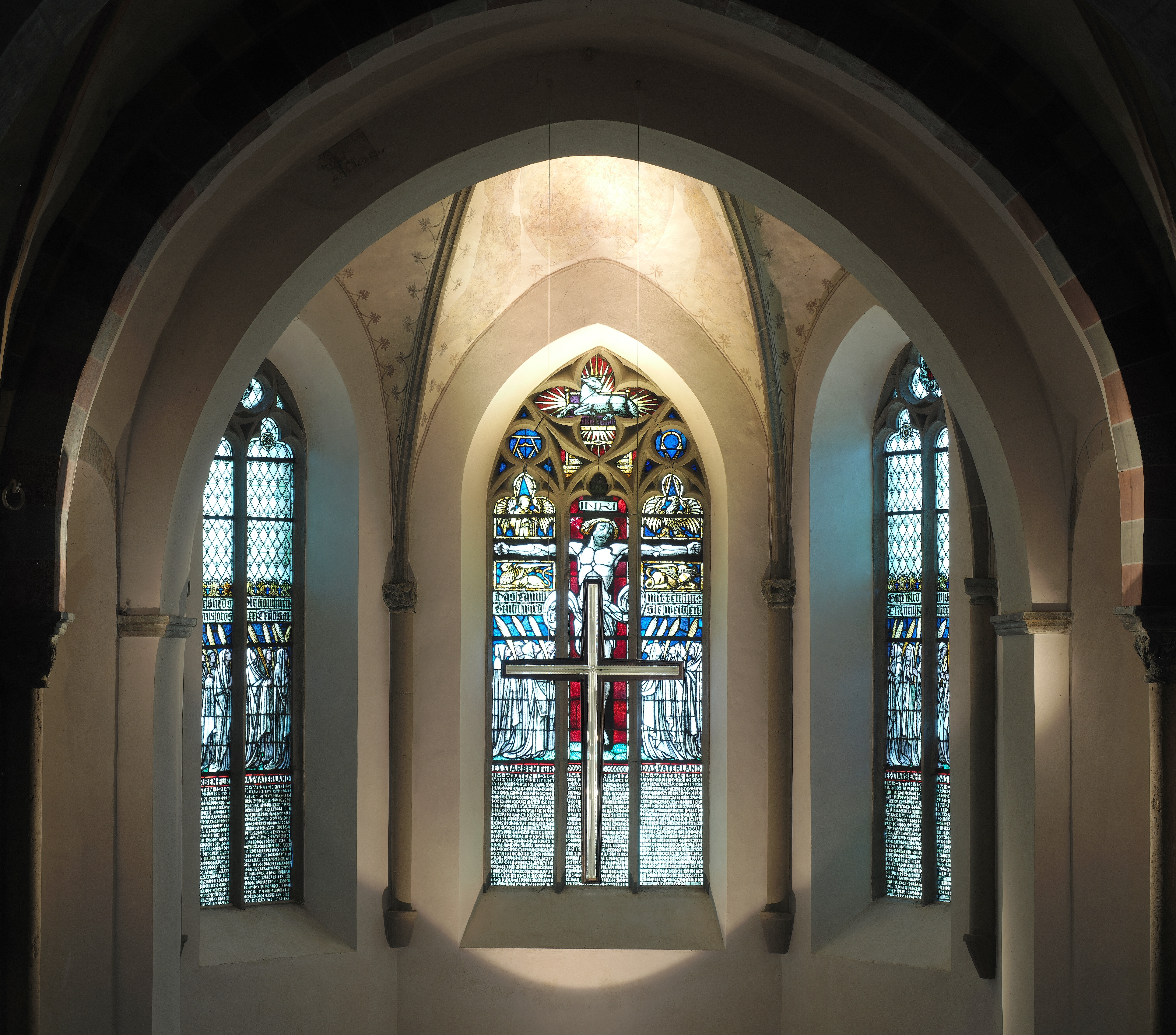 Blick von der Empore auf die Fenster im Chor in der Christuskirche, Kirchplatz 9, Plettenberg. Die Fenster wurden 1923 von Prof. Otto Linnemann geschaffen